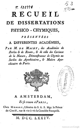 Recueil de dissertations physico-chymiques, 1774, Jacques-François Demachy (1728-1803)